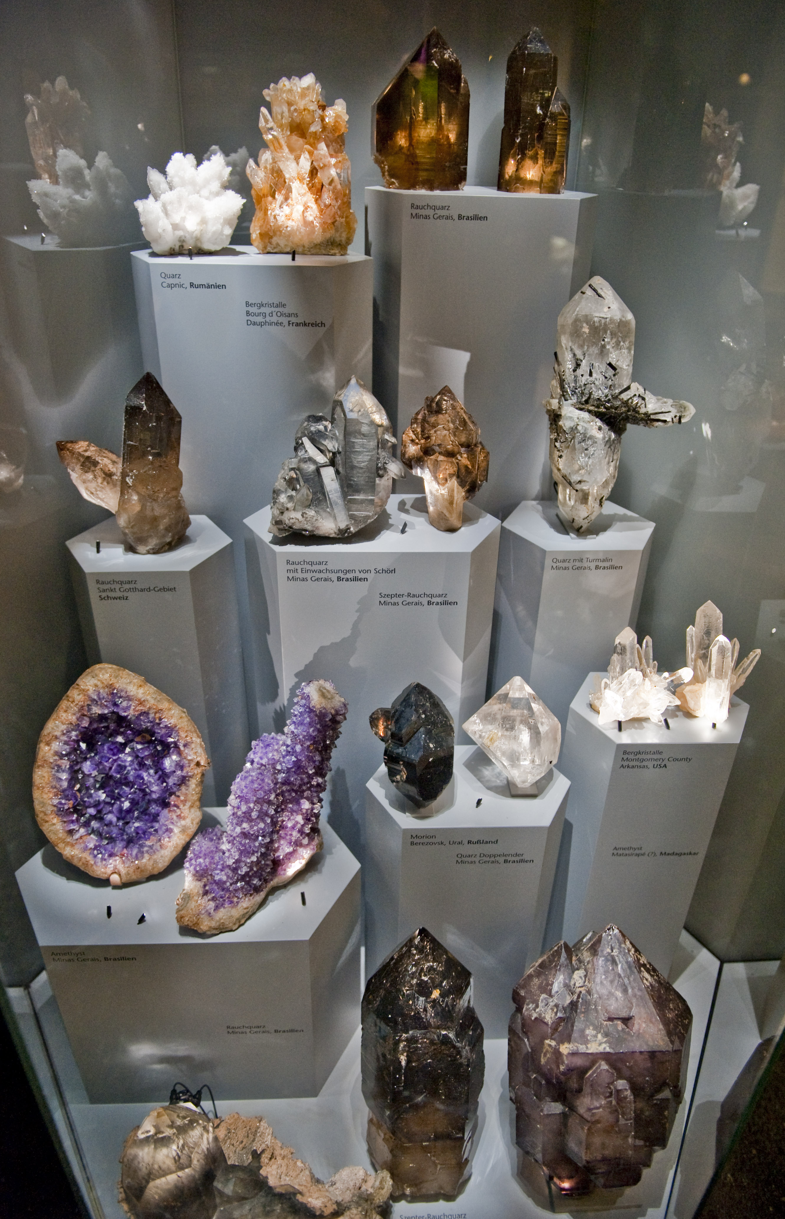 Quartz varieties (Senckenberg Naturmuseum, Frankfurt, Germany)